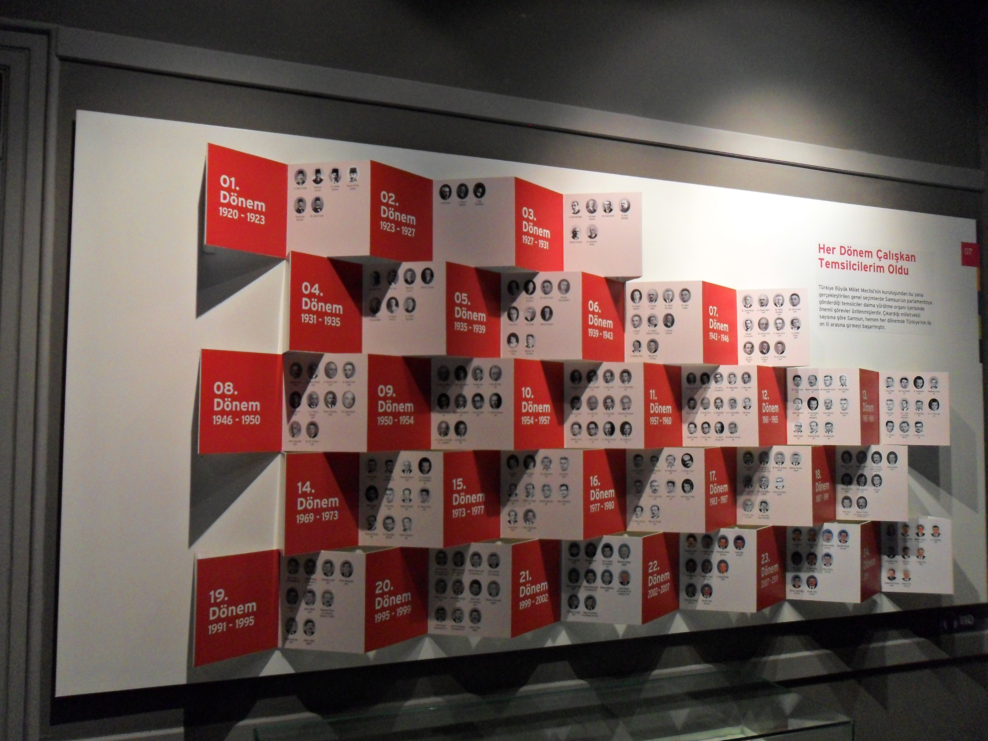 Samsun Kent Müzesi'nde sergilenen Samsun milletvekilleri listesi.